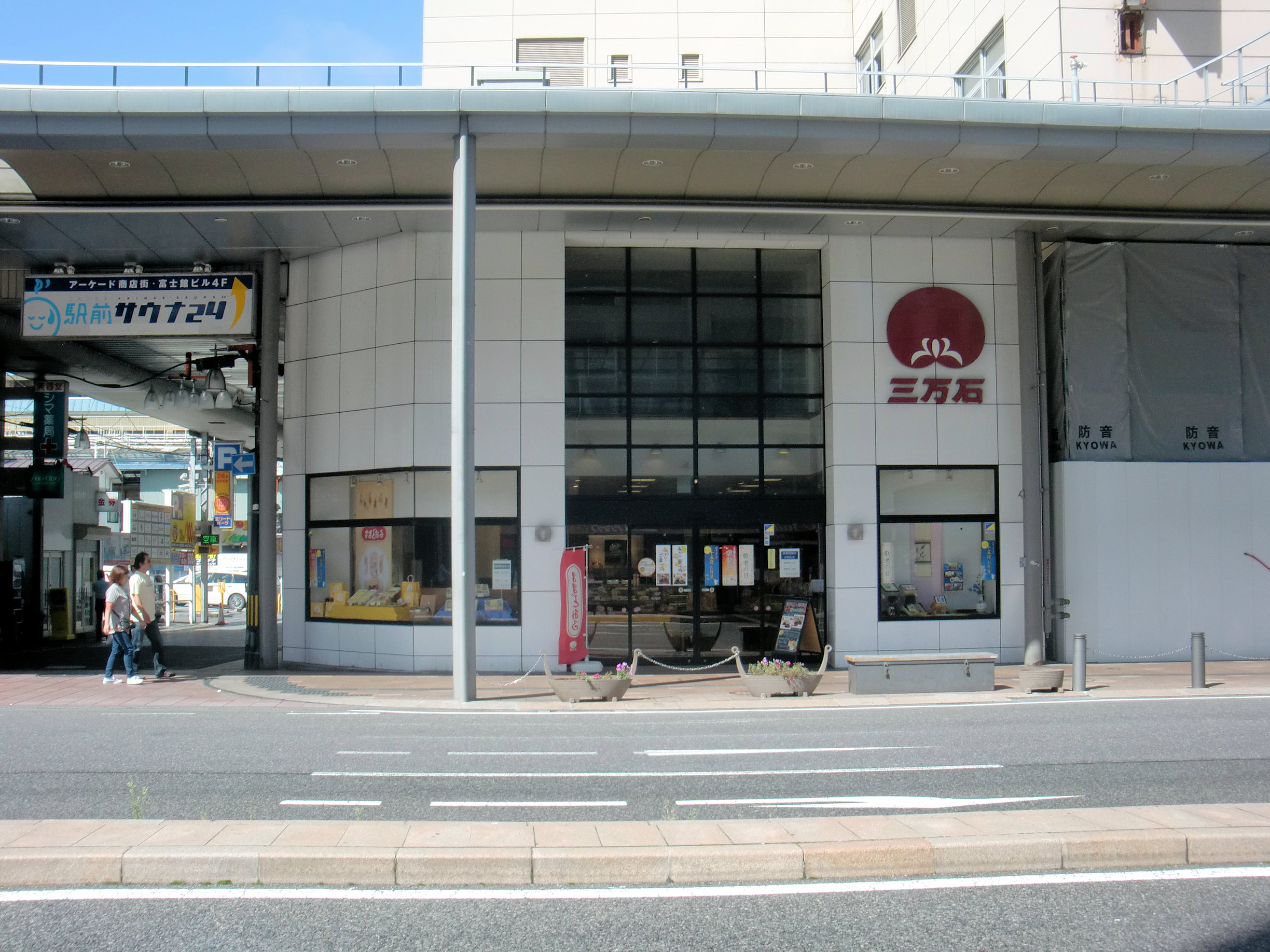 郡山市 ままどおる等で知られる三万石 郡山本店